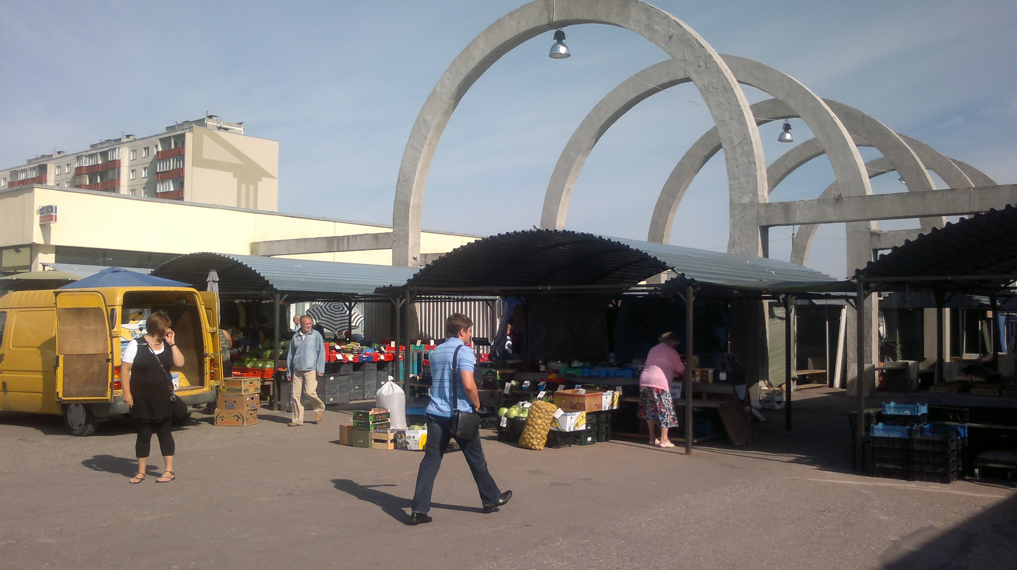 Priisle turg